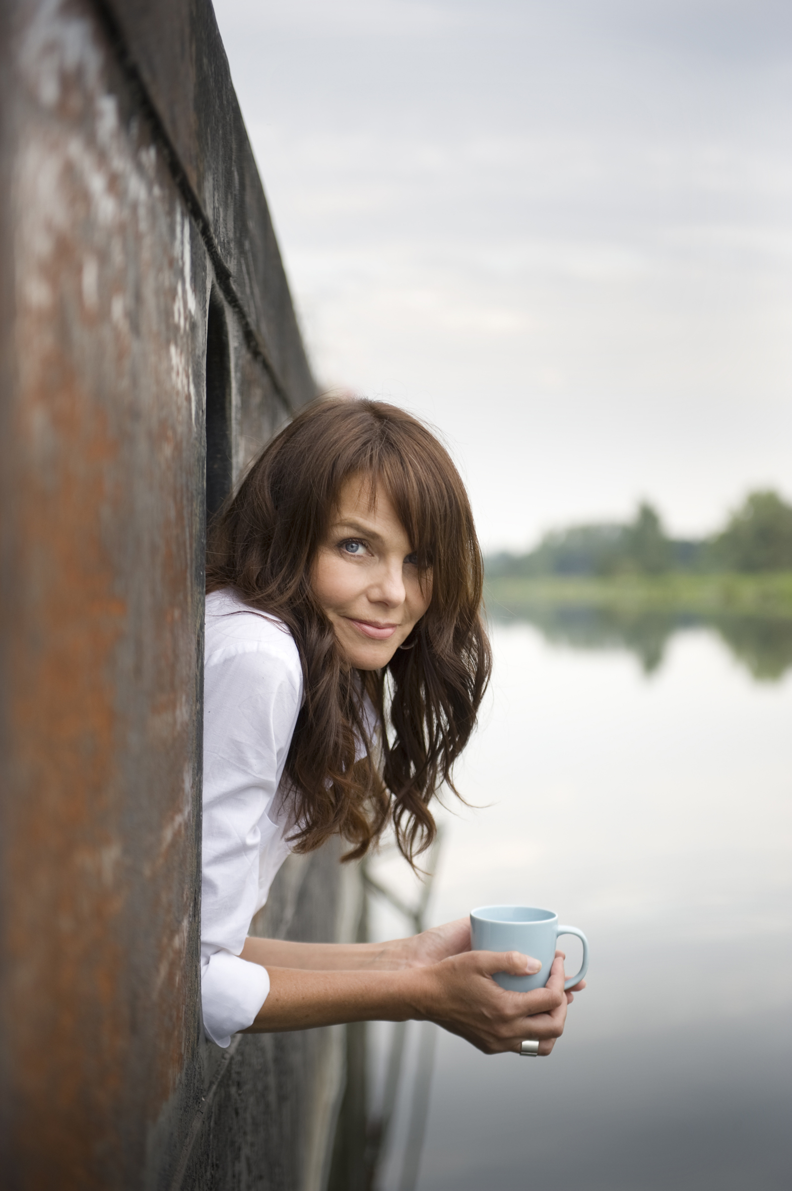 Tine Van den Brande, Vlaams actrice en televisiefiguur.